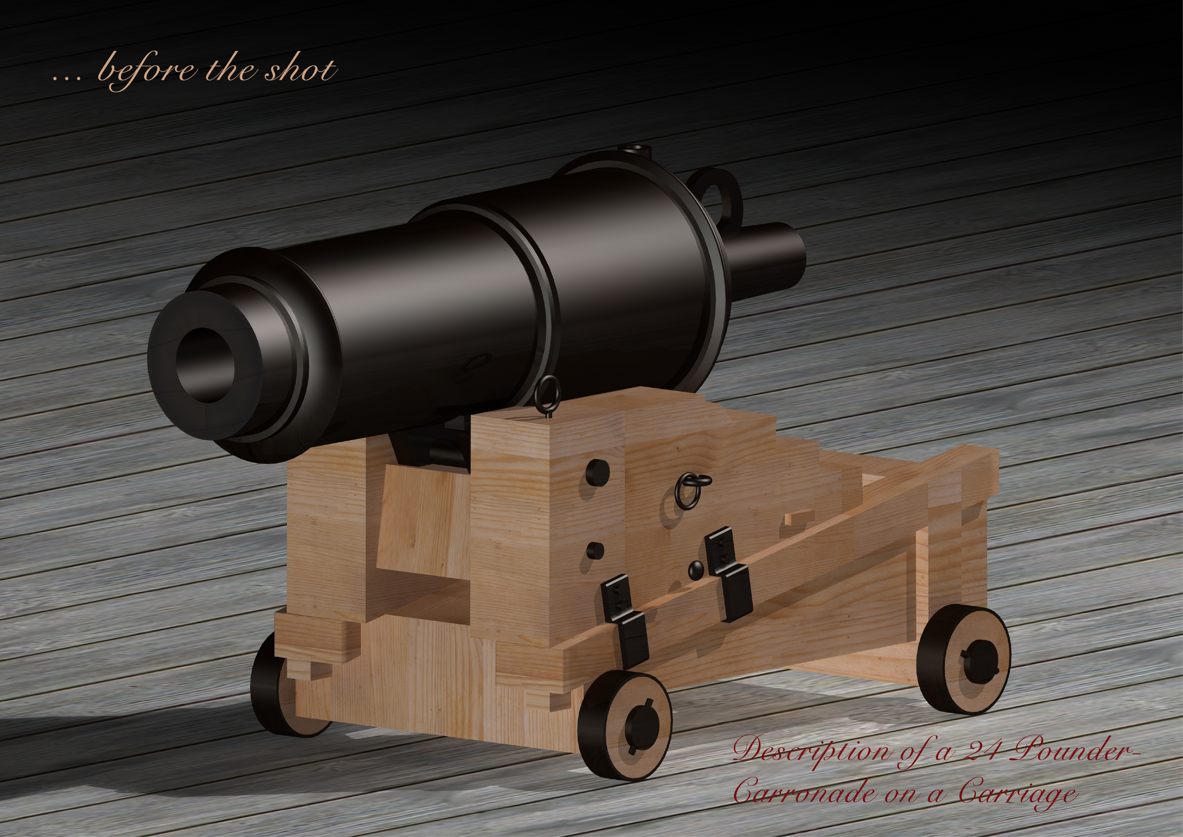 Darstellung einer 24 Pfund Carronade nach der original Zeichnung von Robert Melville - vor dem Schuss